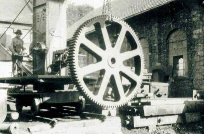 Ein auf der Hütte Bredelar (vorm. Kloster Bredelar) gegossenes Zahnrad um 1900